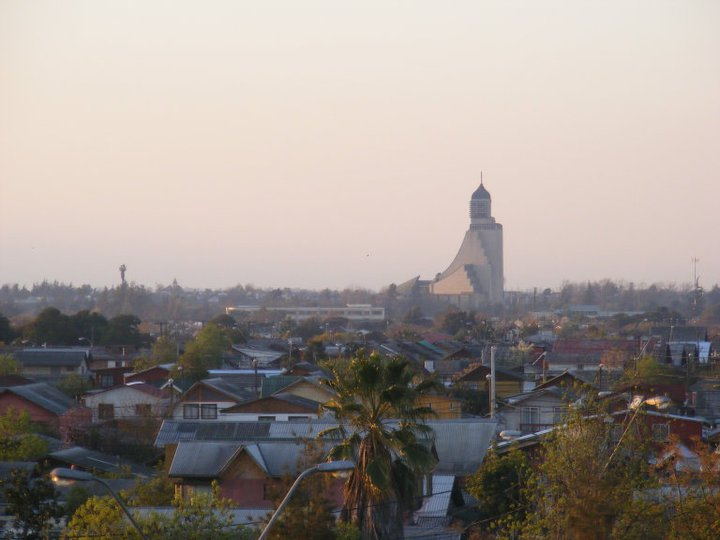 Templo de Maipú desde Villa Los Héroes